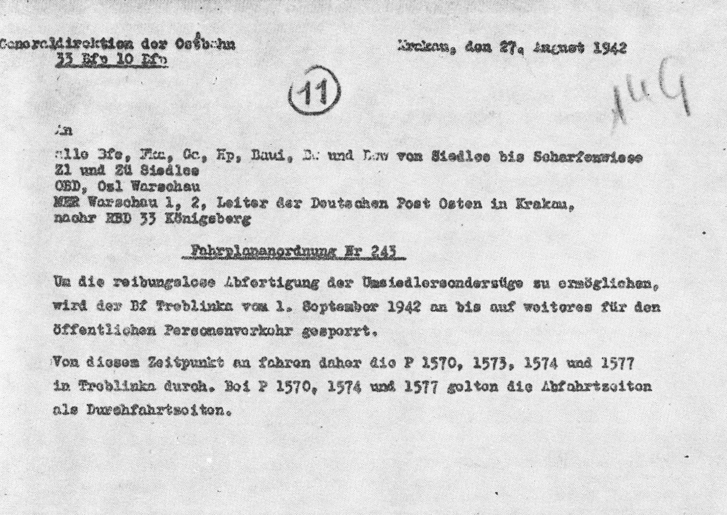 Pierwsza strona rozkładu jazdy nr 243 z dnia 27 sierpnia pociągów transportowych do Treblinki zawierającego informację o zamknięciu od 1 września 1942 do odwołania stacji kolejowej w Treblince dla powszechnego ruchu pasażerskiego